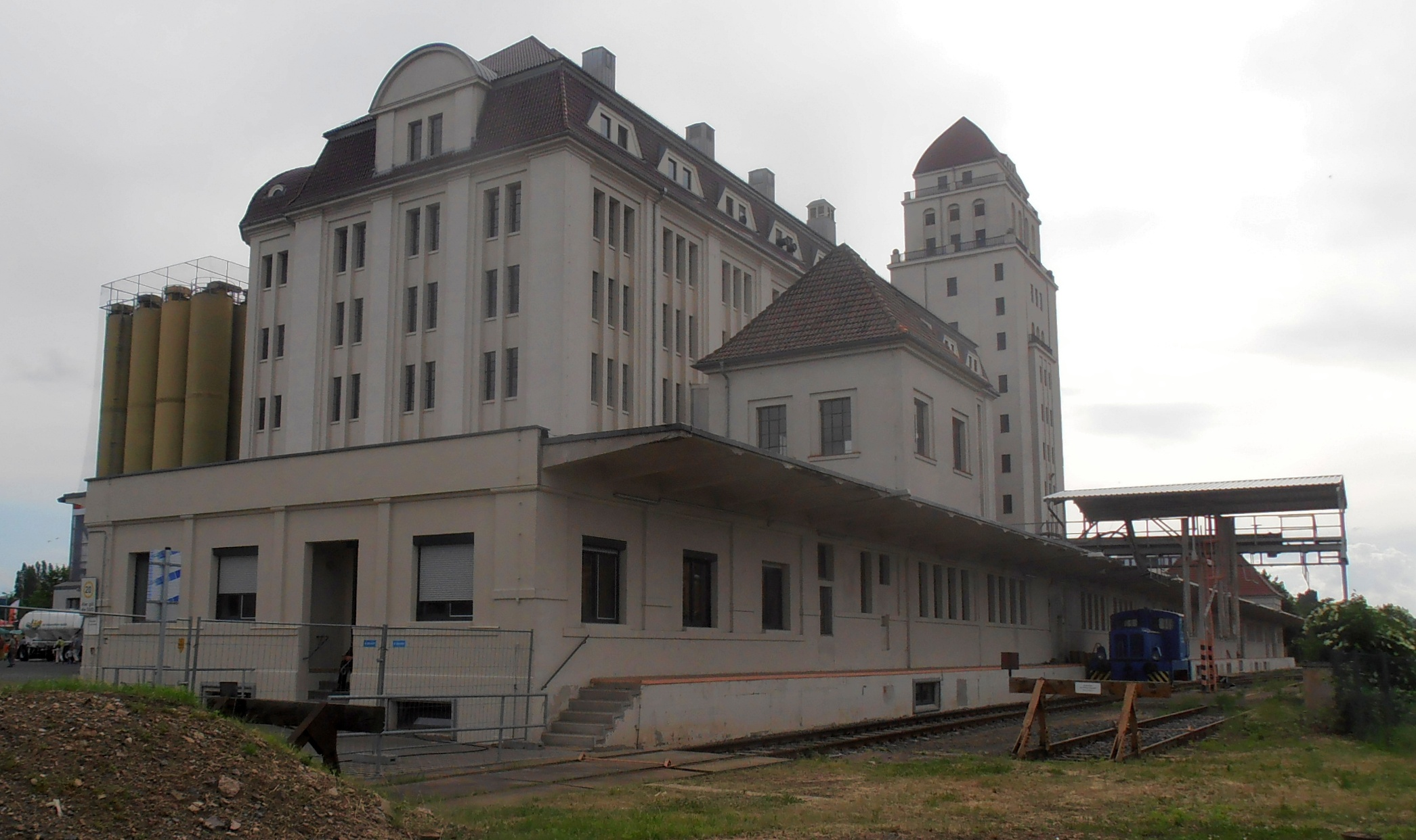 Blick von Nord-Osten zum Tag der offenen Tür